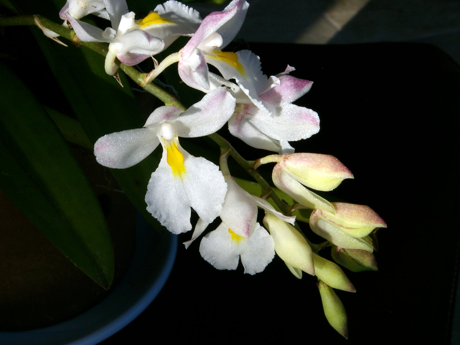 Rodriguezia venusta (Orchidaceae)